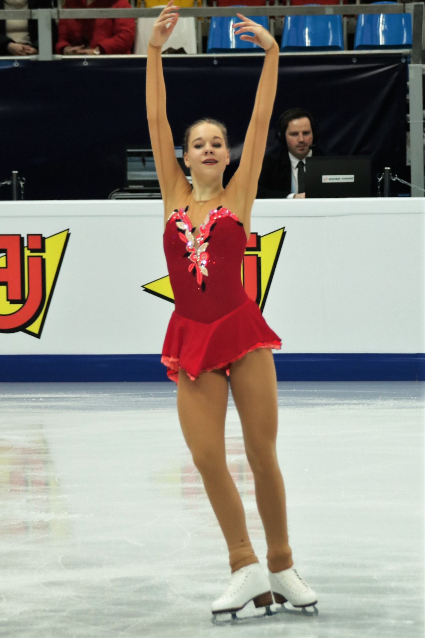 Леа Йоханна Дастич (Германия) на Чемпионате Европы по фигурному катанию 2018.